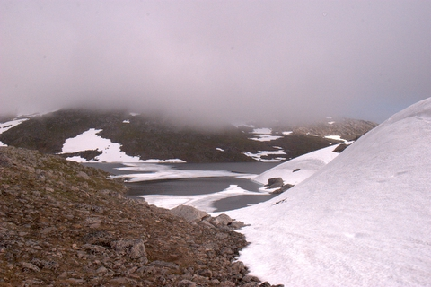 Ingeborgvatnet, Gullesfjord i Troms